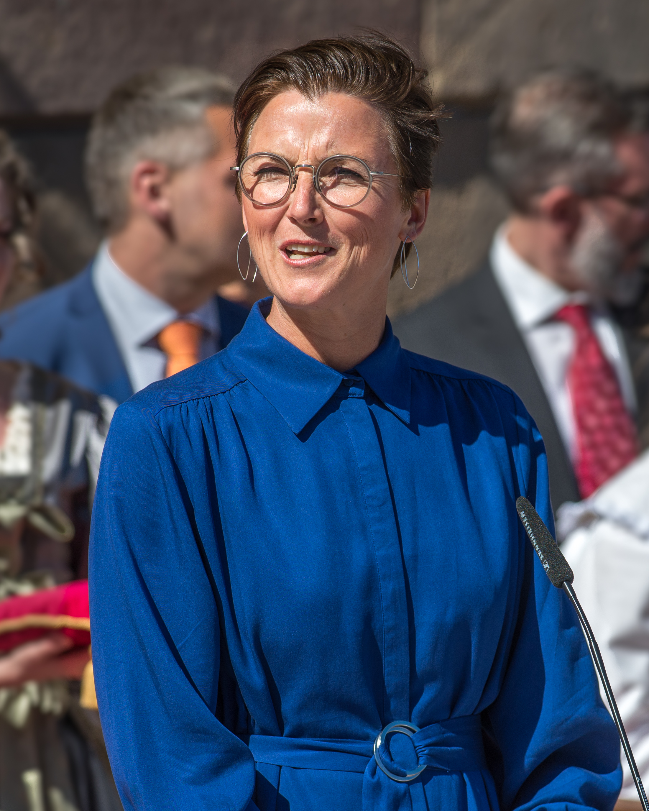 Malin Grundberg nyinviger Livrustkammaren den 17 juni 2019 i närvaro av Carl XVI Gustaf och drottning Silvia.